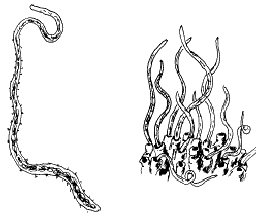 Image des TUBIFEX pour implanter en photo des descriptifs